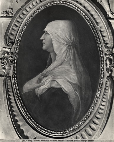 Brogi (photographer), Firenze. Palazzo Vecchio. Caterina Sforza; Giorgio Vasari, Quartiere di Leone X 2